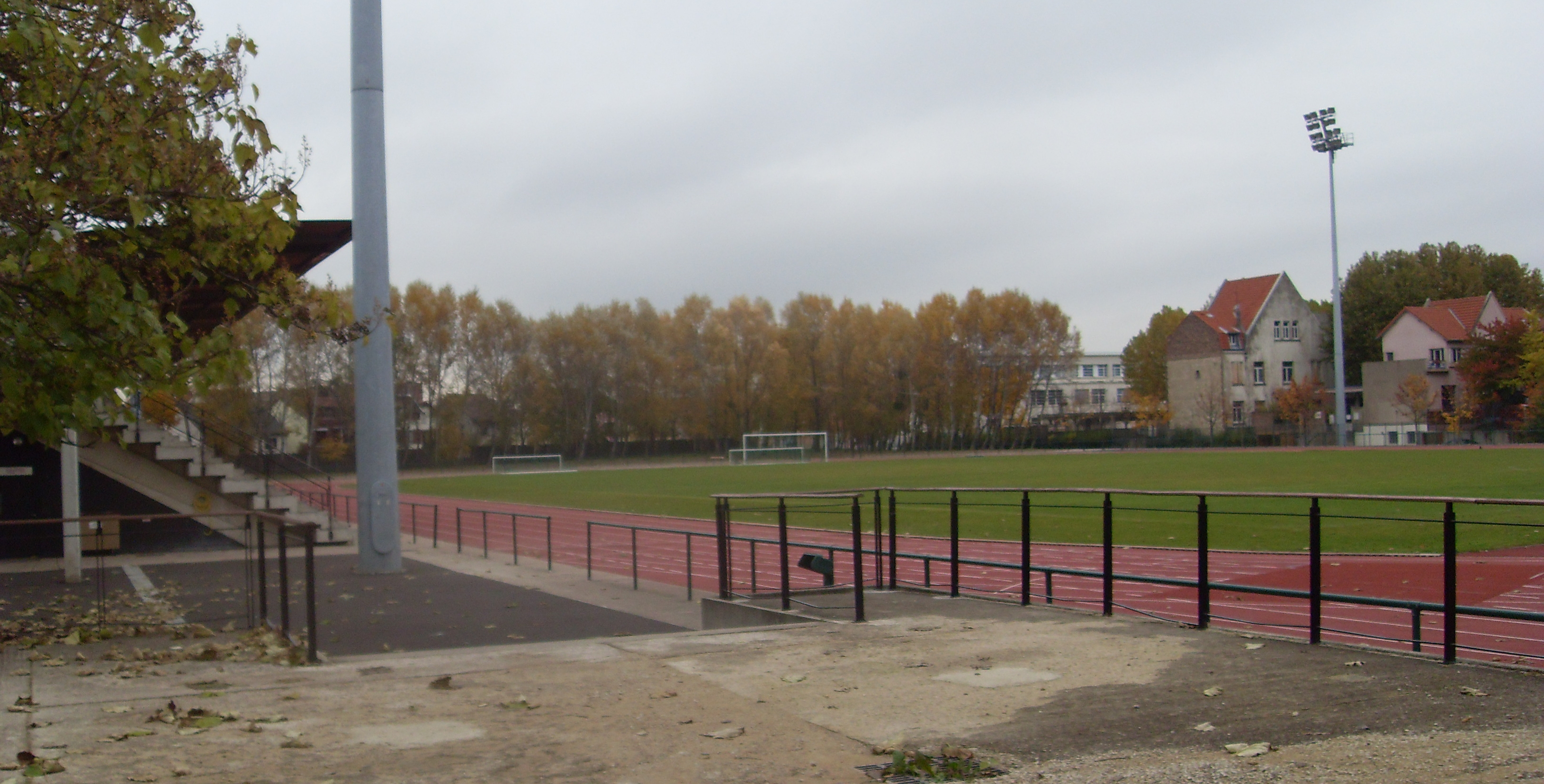 Le Stade Jean Delbert à Montreuil (Seine-Saint-Denis)